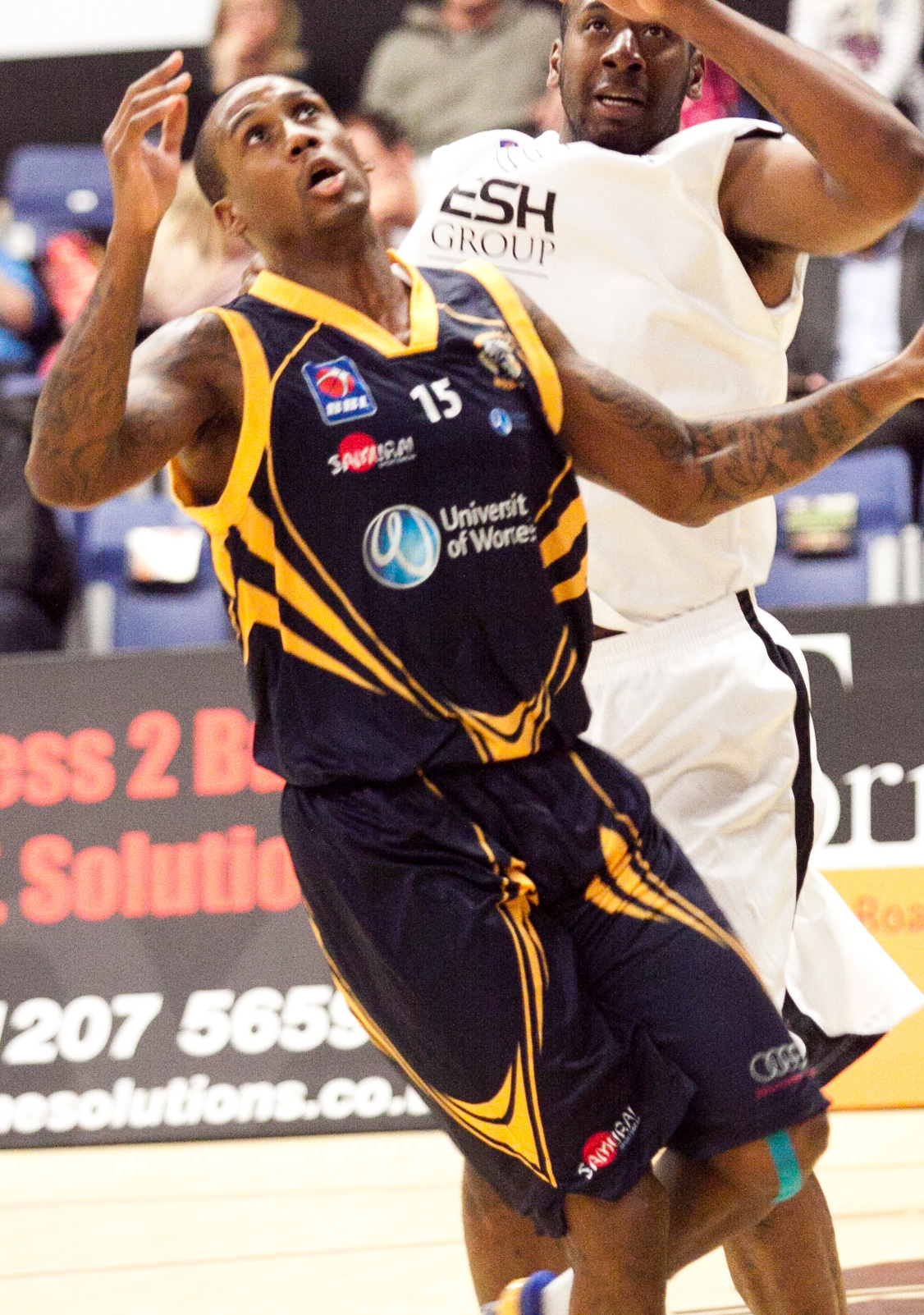 Darius Defoe